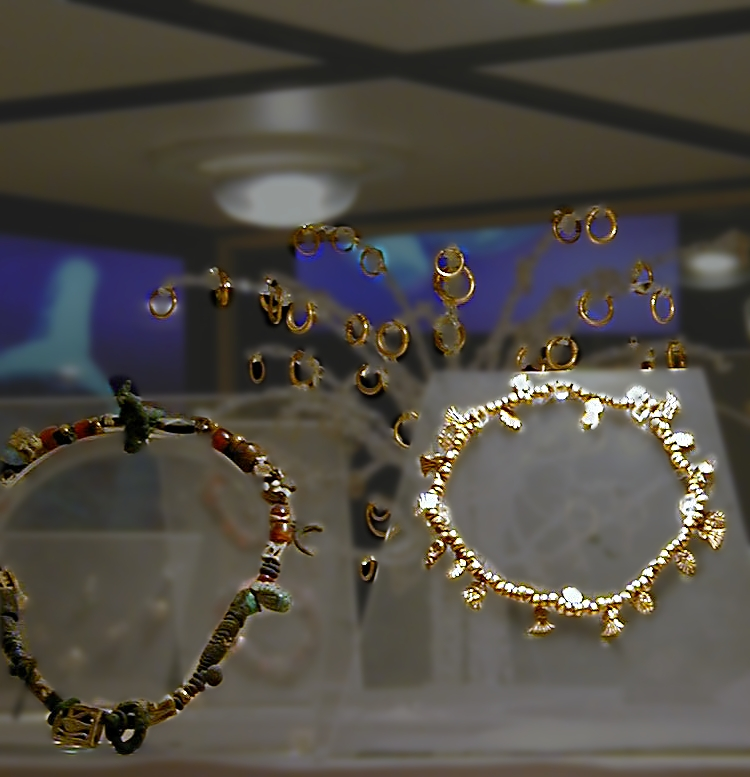 Bijoux puniques au Musée du Bardo